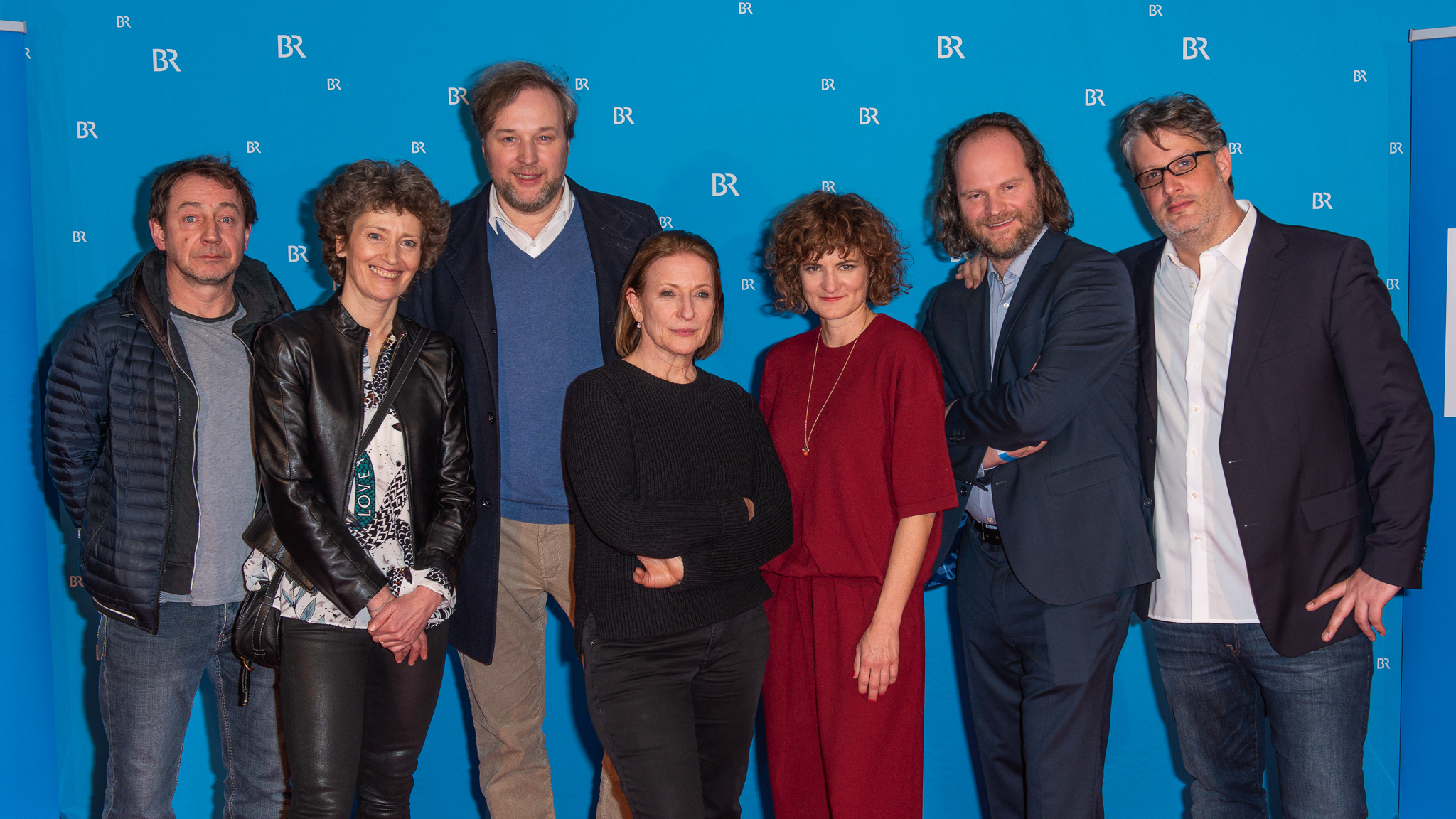 Andreas Leopold Schadt,Bayerischer Rundfunk,Dagmar Manzel,Dr. Stephanie Heckner,Ein Tag wie jeder andere,Eli Wasserscheid,Elisabeth Wasserscheid,Franken-Tatort,Preview,Sebastian Marka,Stephan Grossmann,Tatort,Thorsten Merten